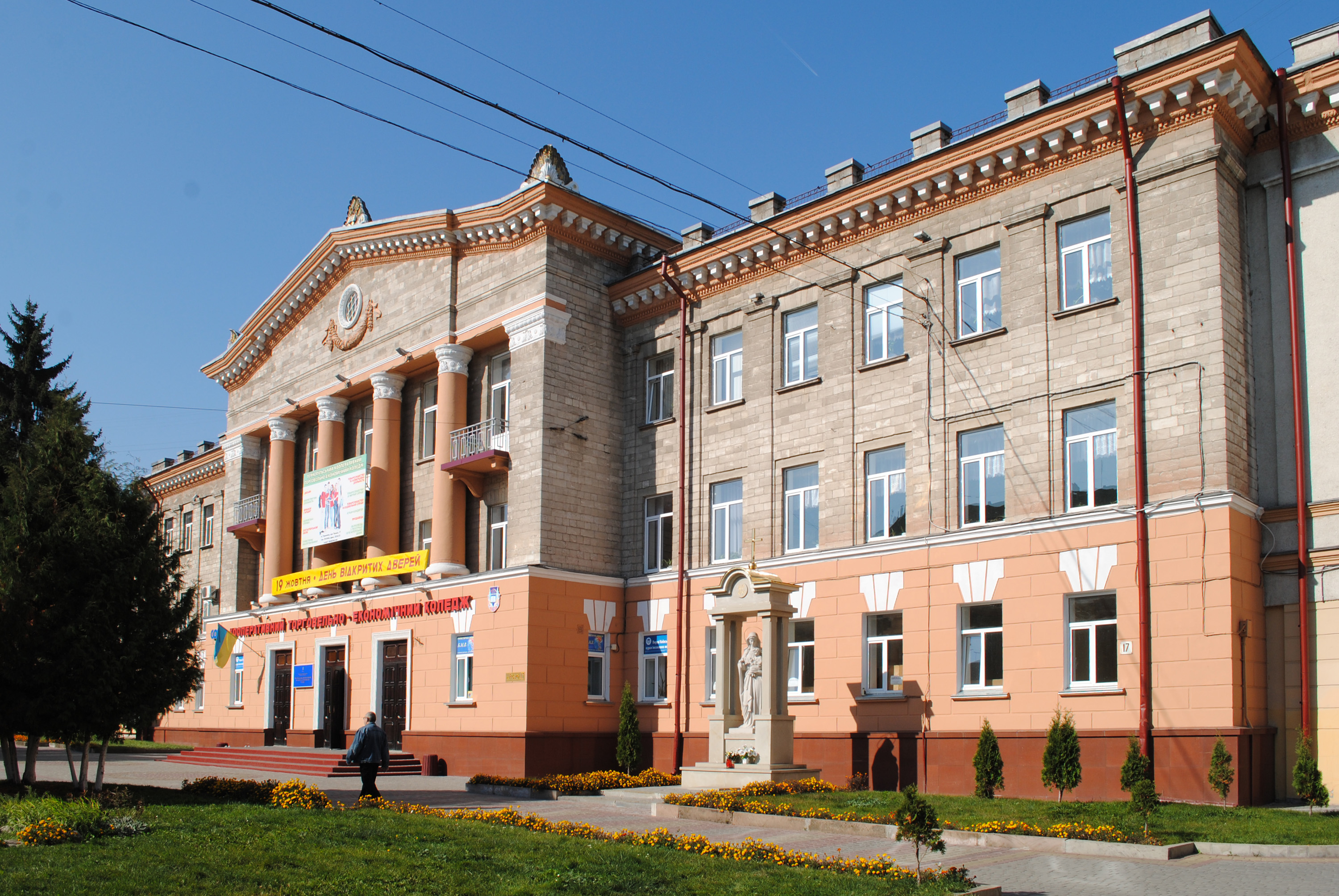 Кооперативний коледж (сер. XX ст., мур.) в Тернополі, вул. Руська, 17.